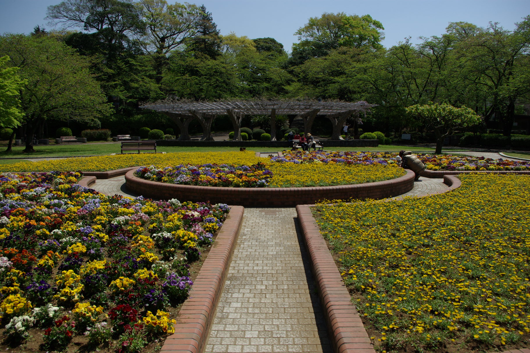 里見公園（千葉県市川市）